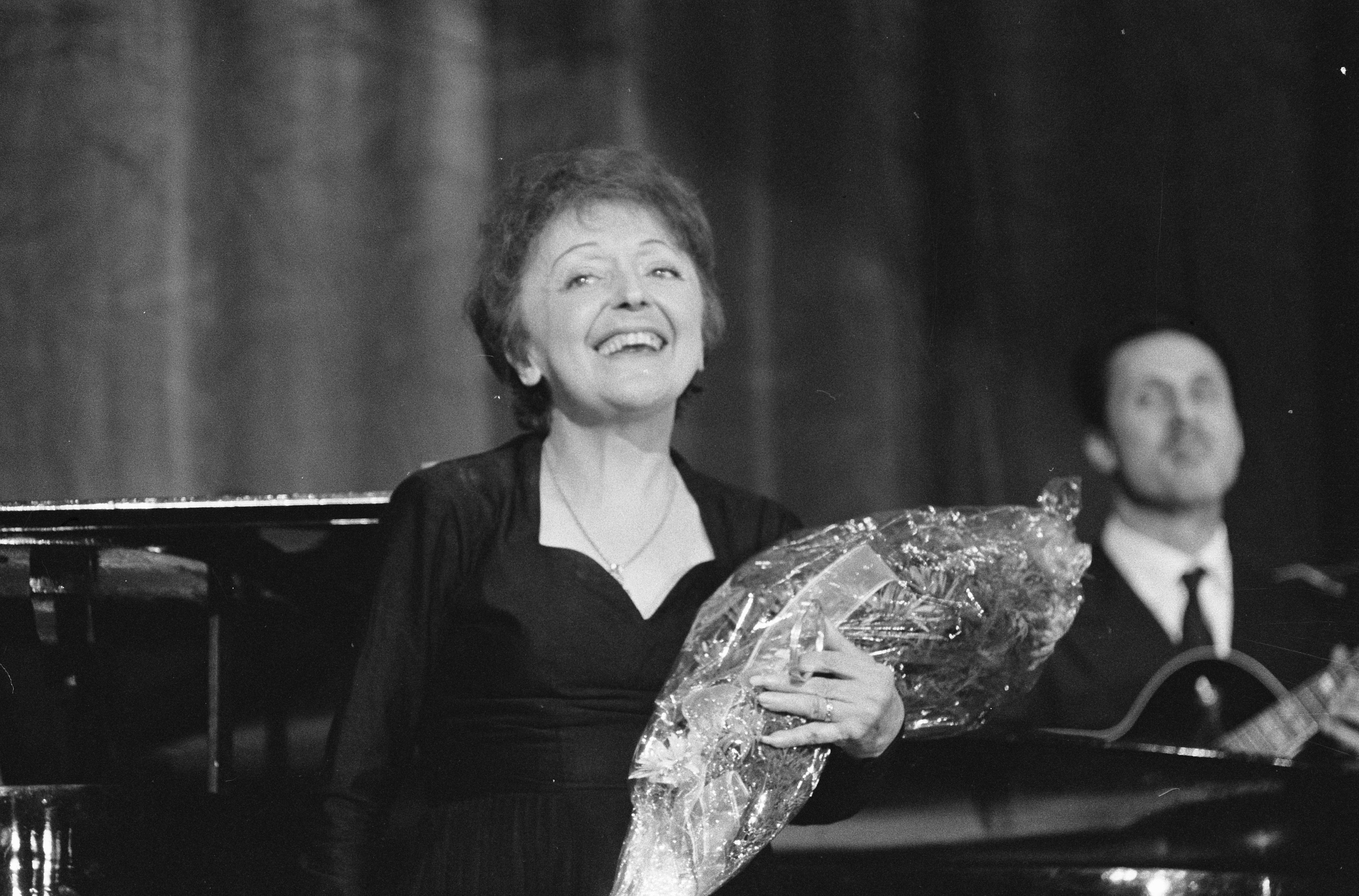 Collectie / Archief : Fotocollectie Anefo Reportage / Serie : [ onbekend ] Beschrijving : Edith Piaf zingt in ons land Datum : 13 december 1962 Locatie : Rotterdam, Zuid-Holland Trefwoorden : bloemen, muziek, zangeressen Persoonsnaam : Piaf, Edith Fotograaf : Koch, Eric / Anefo Auteursrechthebbende : Nationaal Archief Materiaalsoort : Negatief (zwart/wit) Nummer archiefinventaris : bekijk toegang 2.24.01.05 Bestanddeelnummer : 914-6439